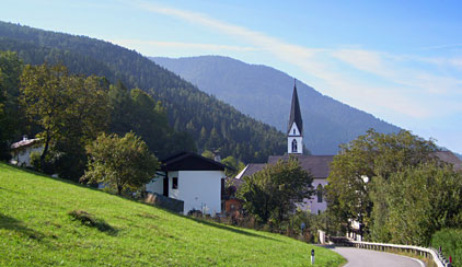 Il paese e la chiesa gotica di S. Udalrico.